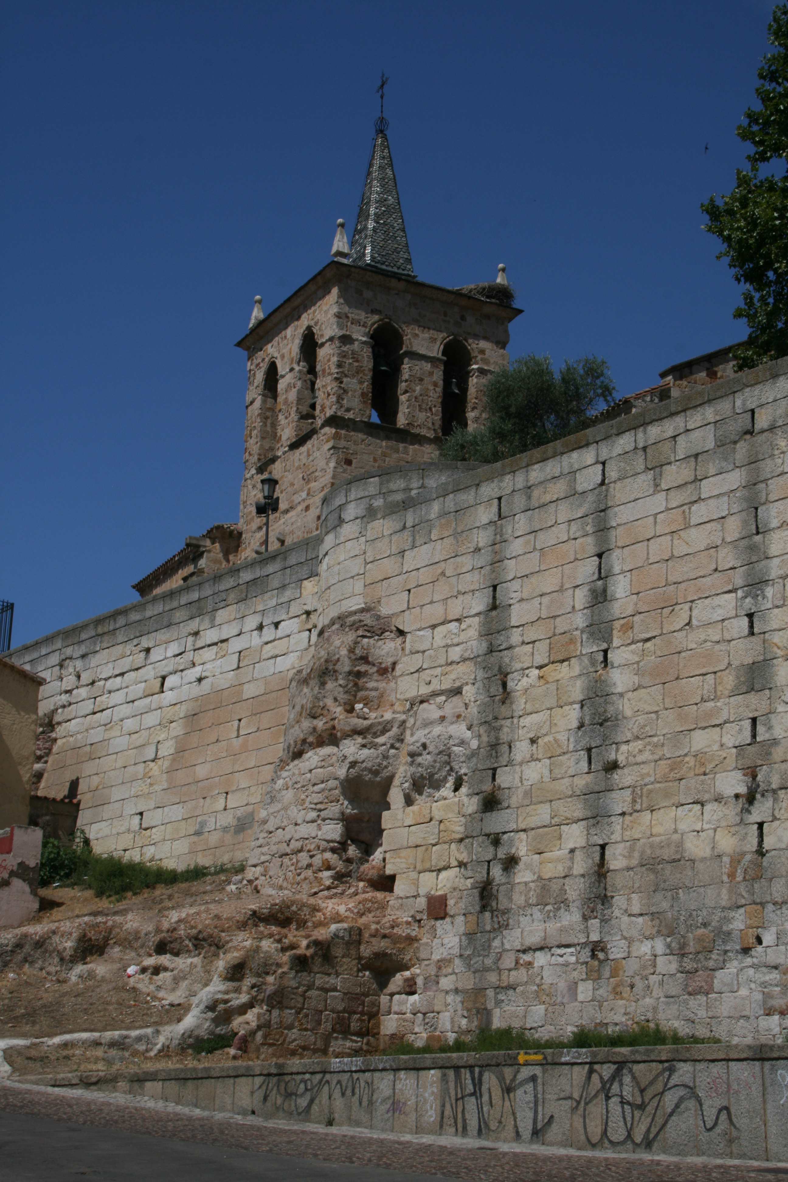 Subida desdel barrio madieval - Zamora